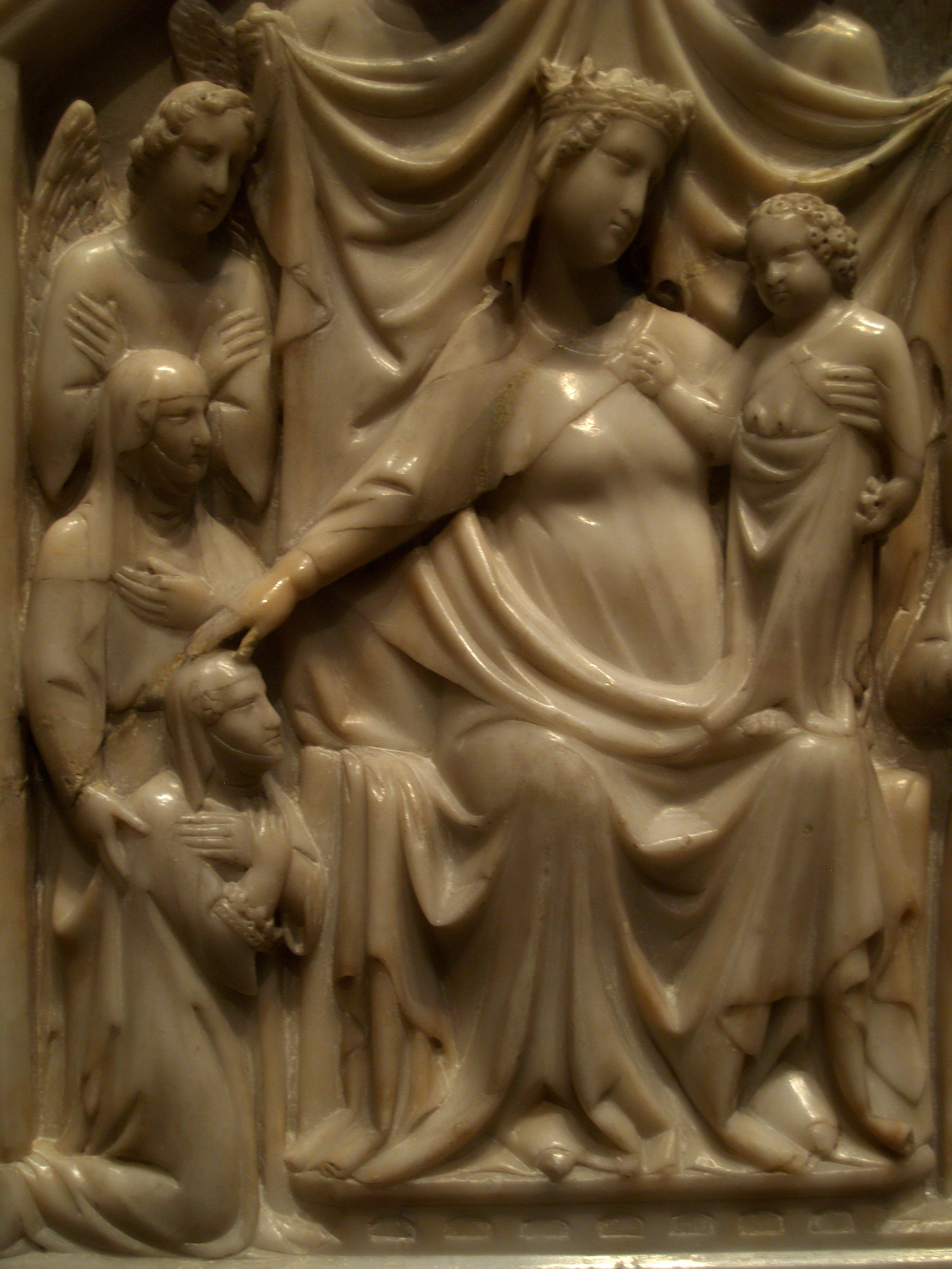 Washington, National Gallery. Tino di Camaino, Virgen con Niño y la reina Sancha.